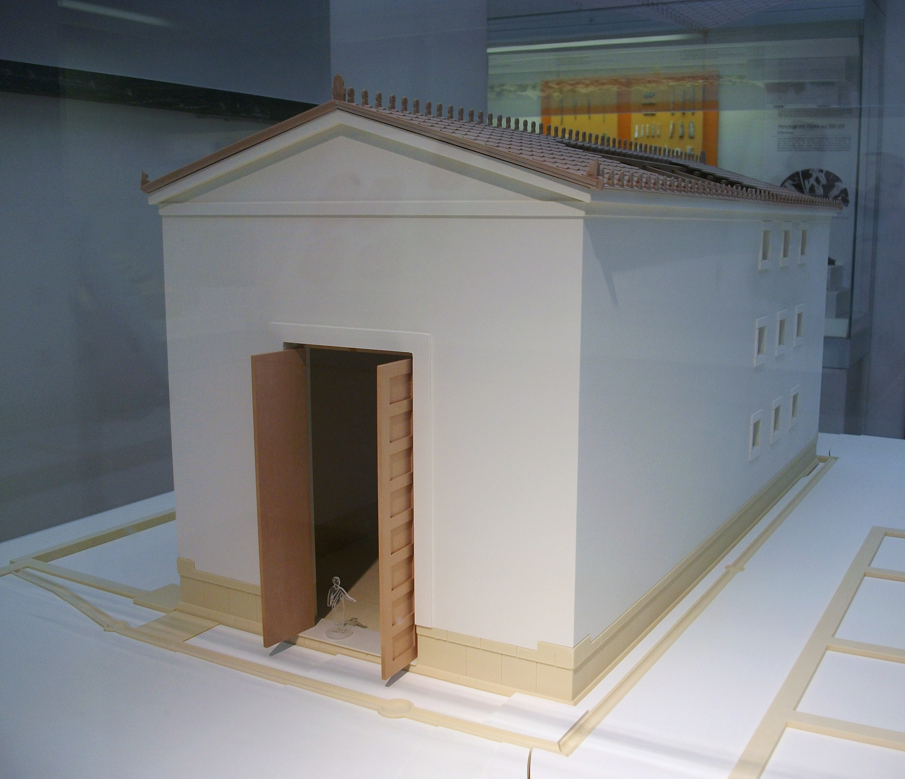 Maqueta del taller de Fídies, Museu arqueològic d'Olímpia.